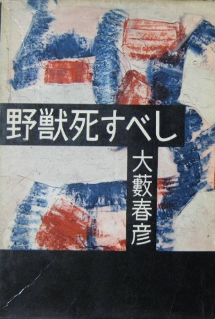 大藪春彦『野獣死すべし』1958年初版 大日本雄弁会講談社刊